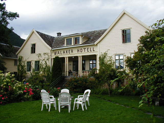 Walaker hotell in Solvorn, Luster